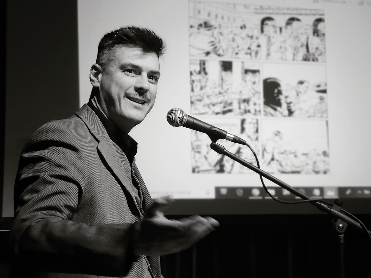 Gigi Simeoni